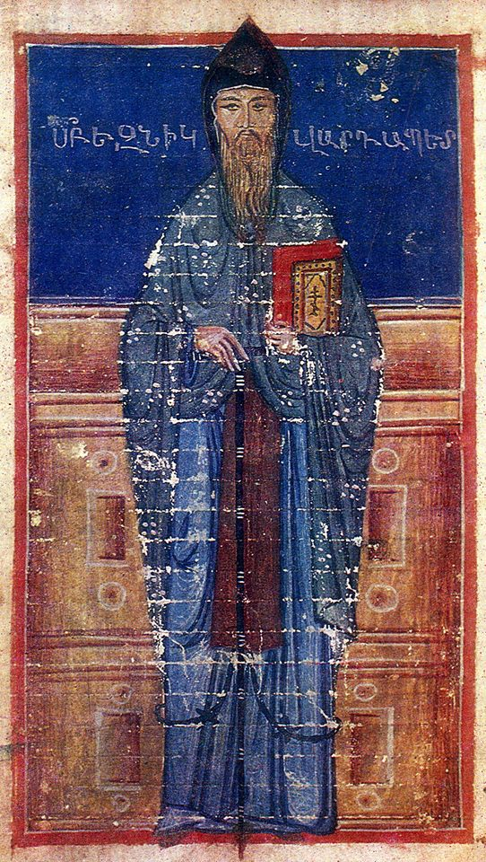 Выдающийся армянский богослов Езник Кохбаци